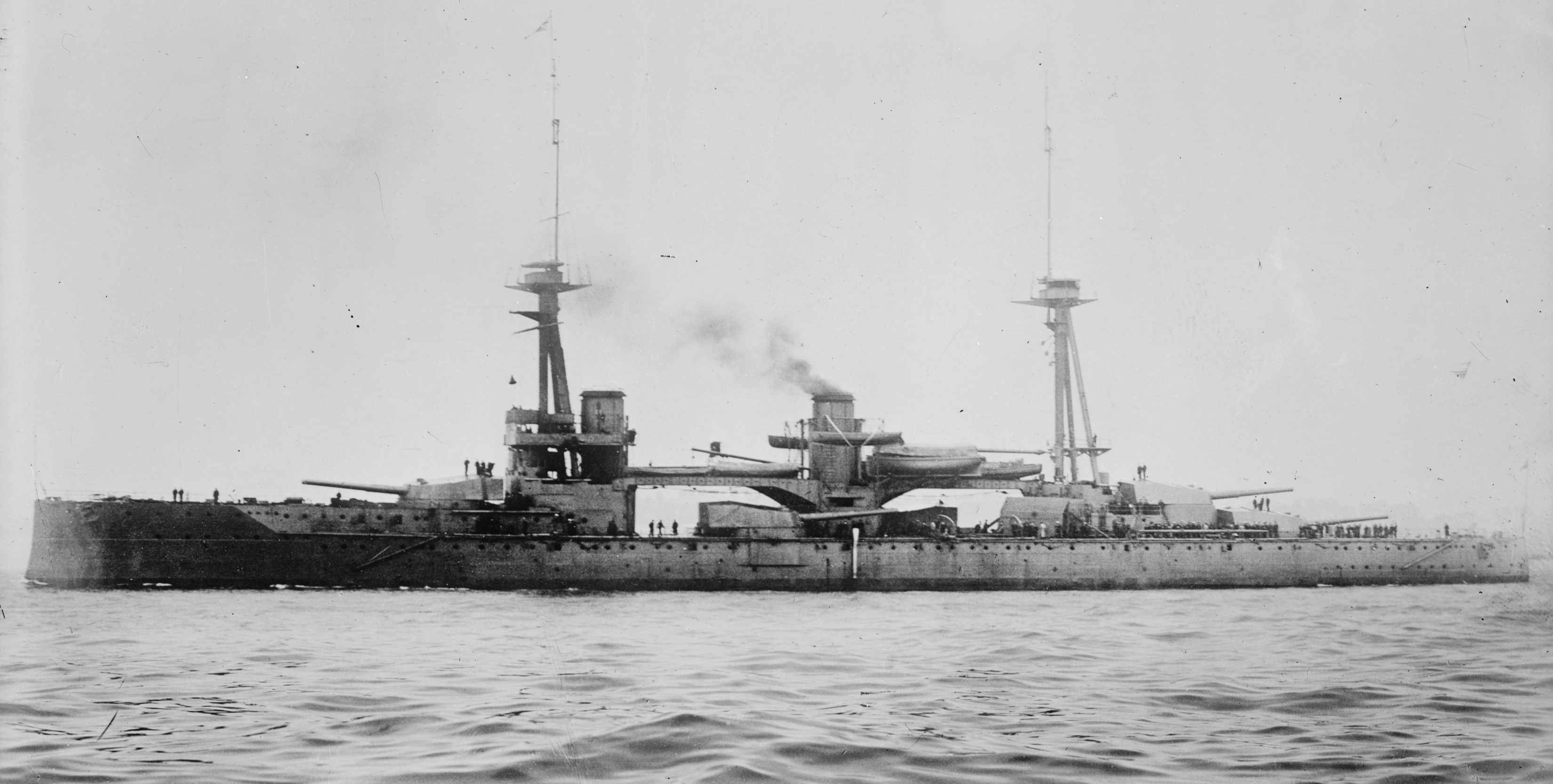 HMS Neptune